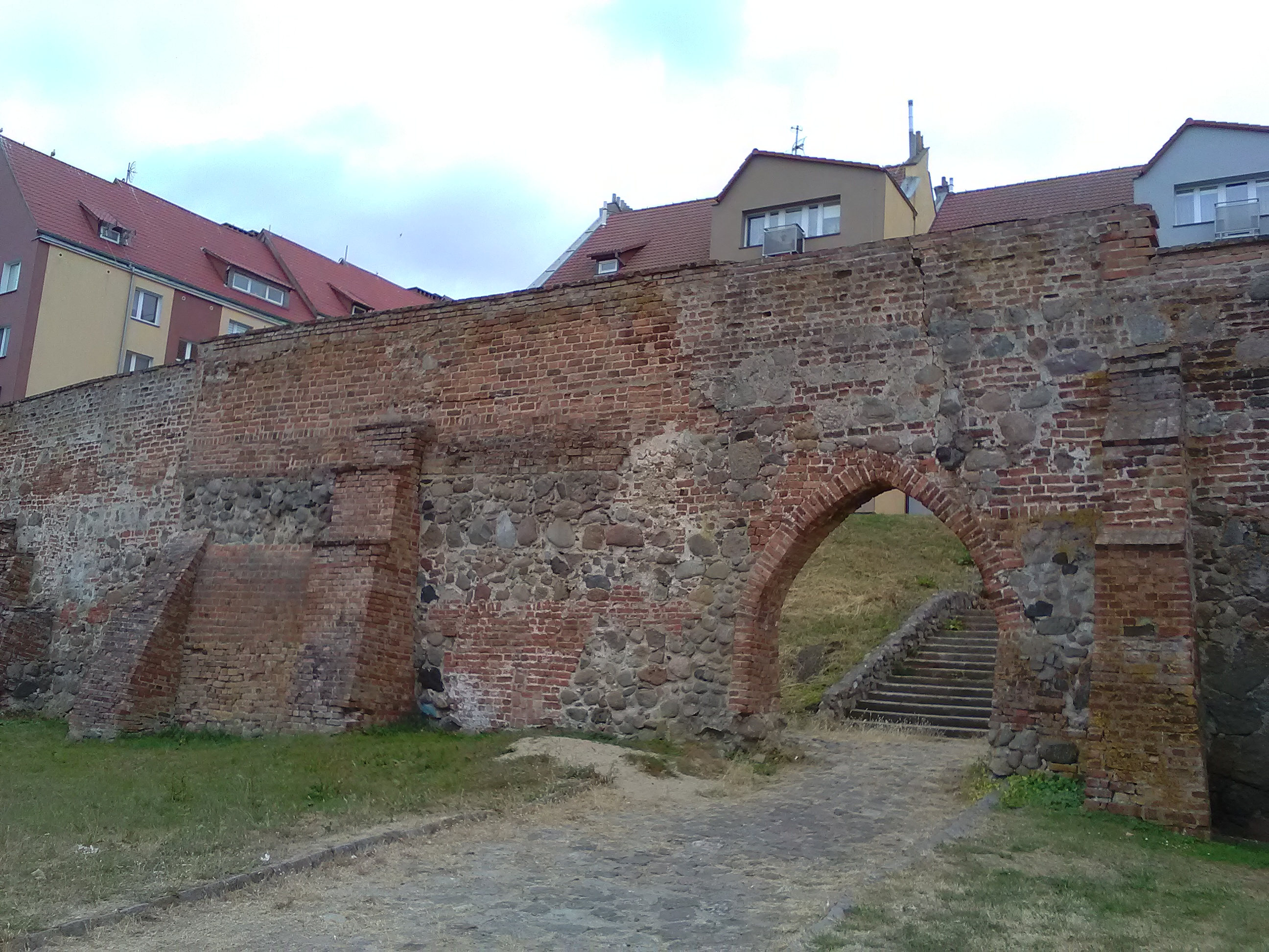 Mury obronne w Kamieniu Pomorskim.